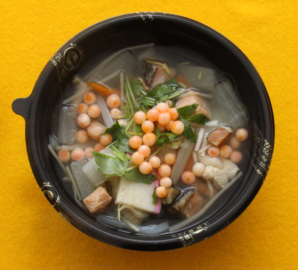 新発田雑煮：伝統的に新発田地域で食されてきた具沢山雑煮